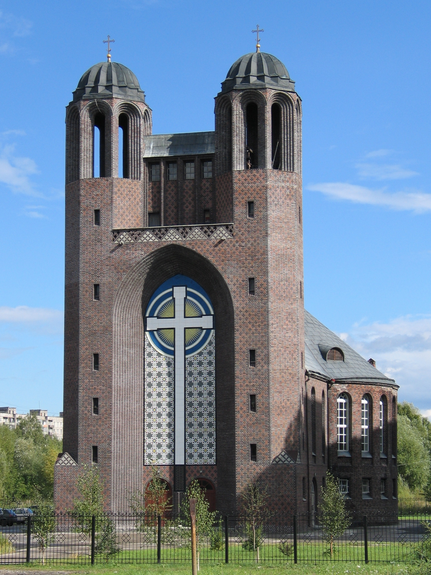 Креcтовоздвиженский собор в г. Калининград